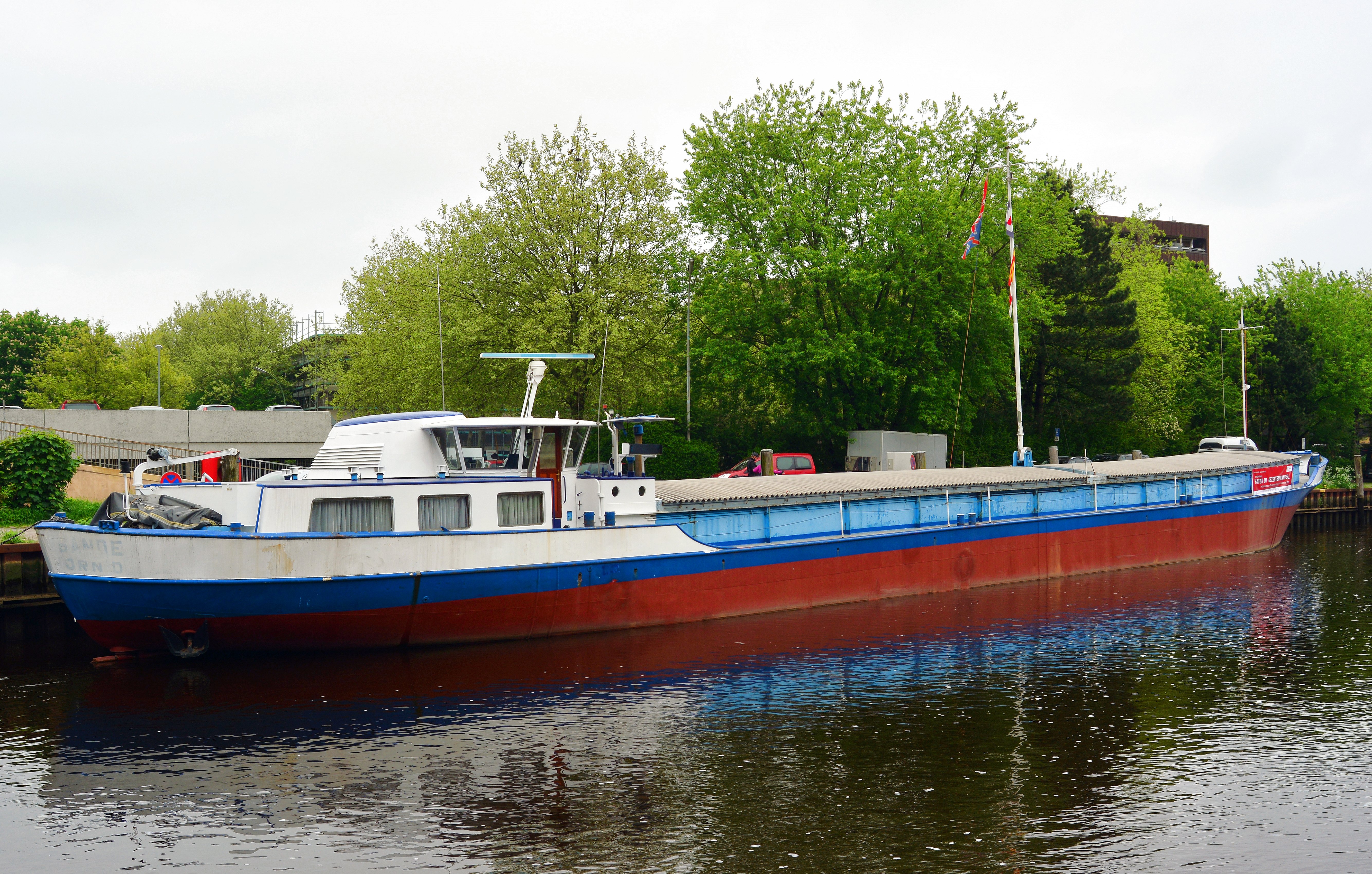 Das Frachtschff Klostersande im Elmshorner Hafen